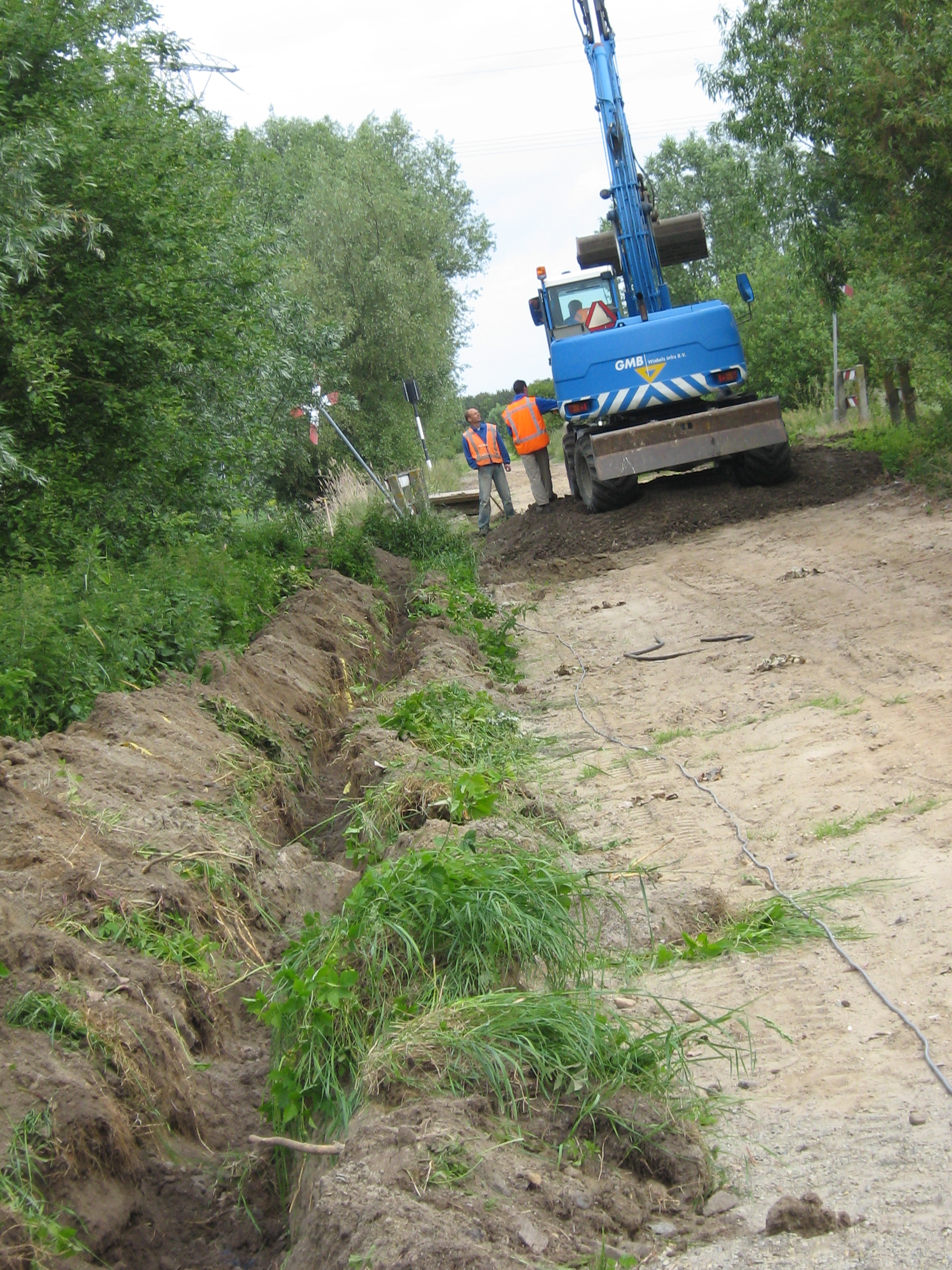 Zeêuws: De ouwe sloelijn wor opgebroken bie Endewehe